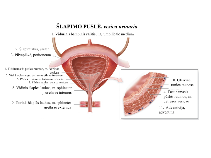 Šlapimo pūslės sandara.